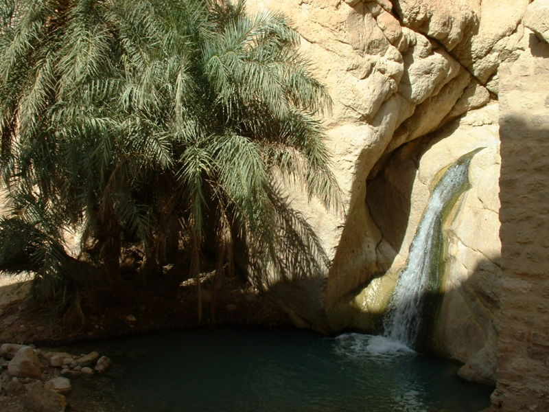 Photographie personnelle prise à Chebika (Tunisie), chute d'eau alimentant l'oasis